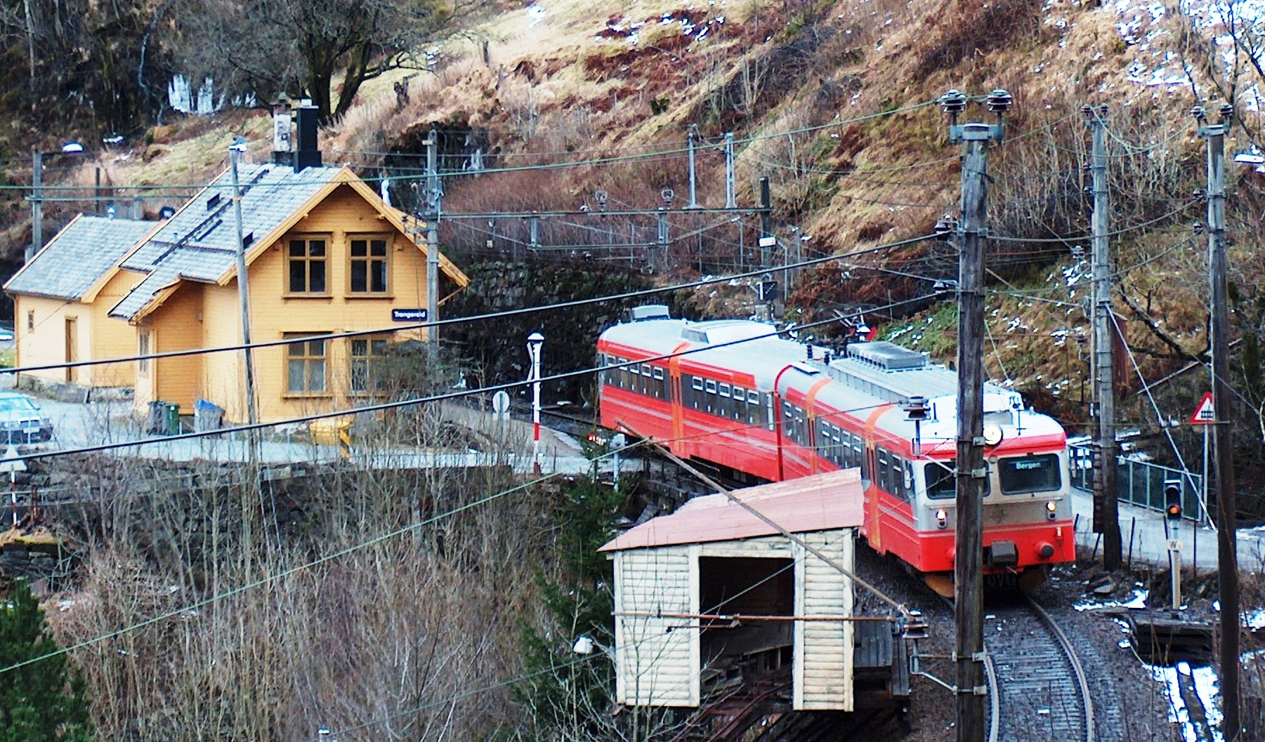 Trengereid stasjon